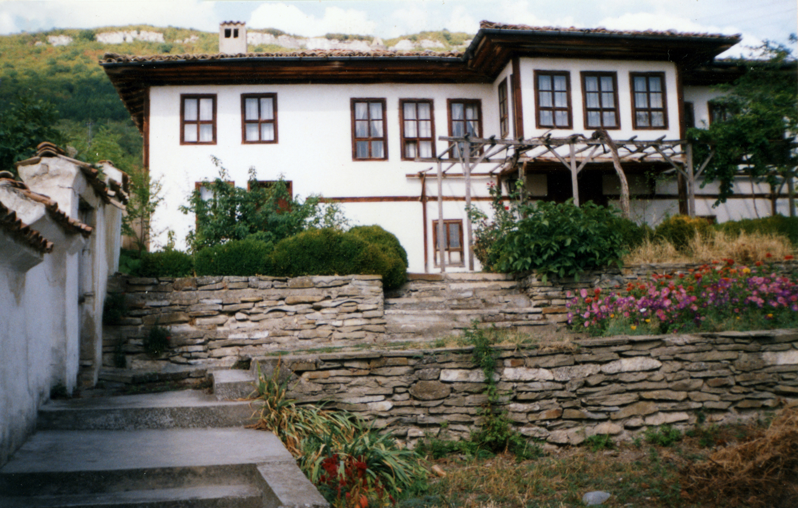 Къща музей "Тодор Рахнев" в кв. Дивдядово, гр. Шумен